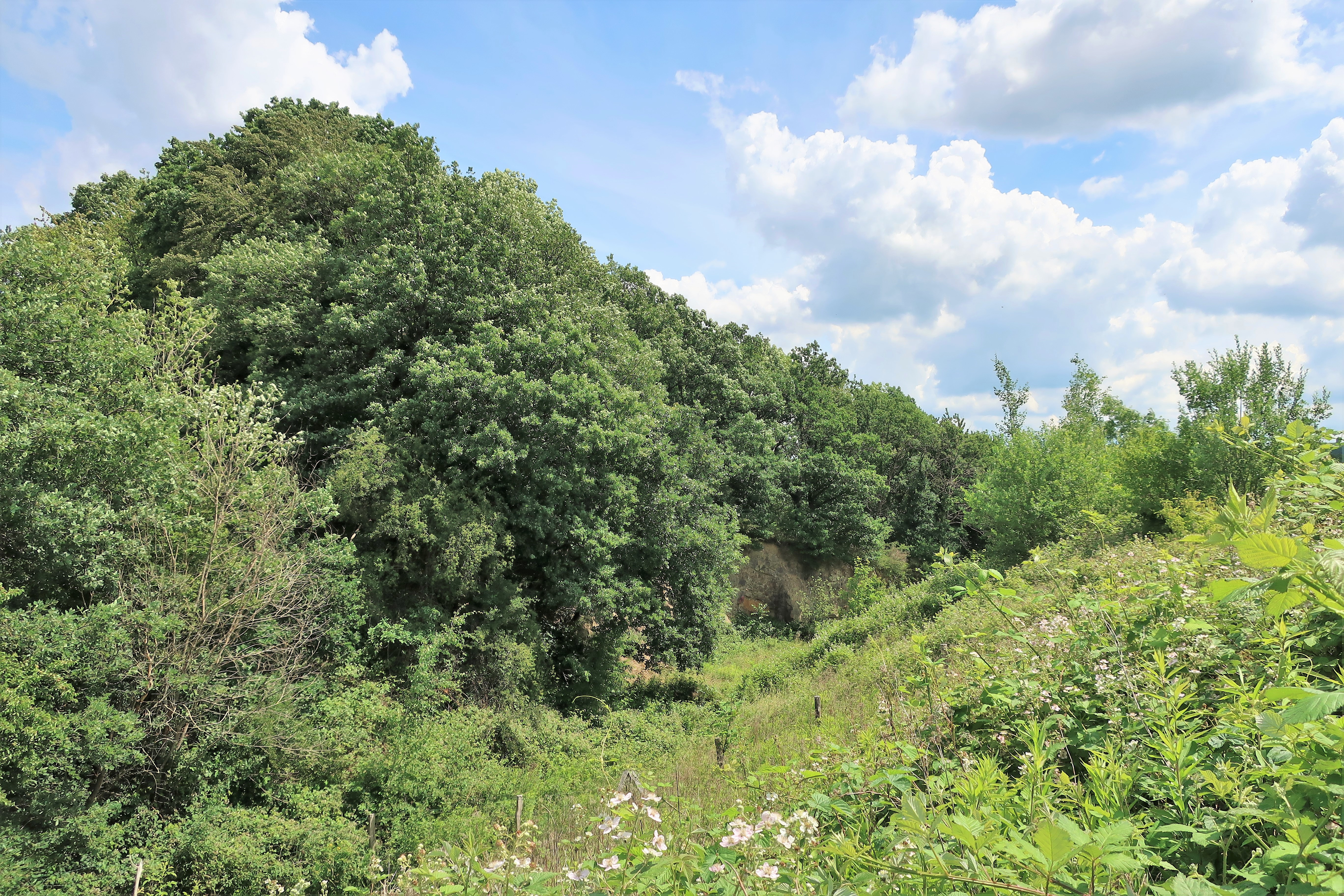 Geschützter Landschaftsbestandteil 1.4.2.44 „Haspe-Heubing (Geweke)“ in Hagen, westlich der Tückingstraße am Fuße des Roderberges. Es handelt sich um die verbliebene Steilwand eines ehemaligen Ziegelschieferbruches in den Hagener Schichten des Oberkarbons mit Wechsellagerungen von Ton-, Alaun-, Sandschiefern und Grauwacke sowie fossilen Funden aus dem Karbon. Die beachtenswerten Kleinfältungen, Spezialsättel und Mulden sind verkippt. An der oberen Hangkante erstreckt sich eine artenreiche Gehölzreihe.